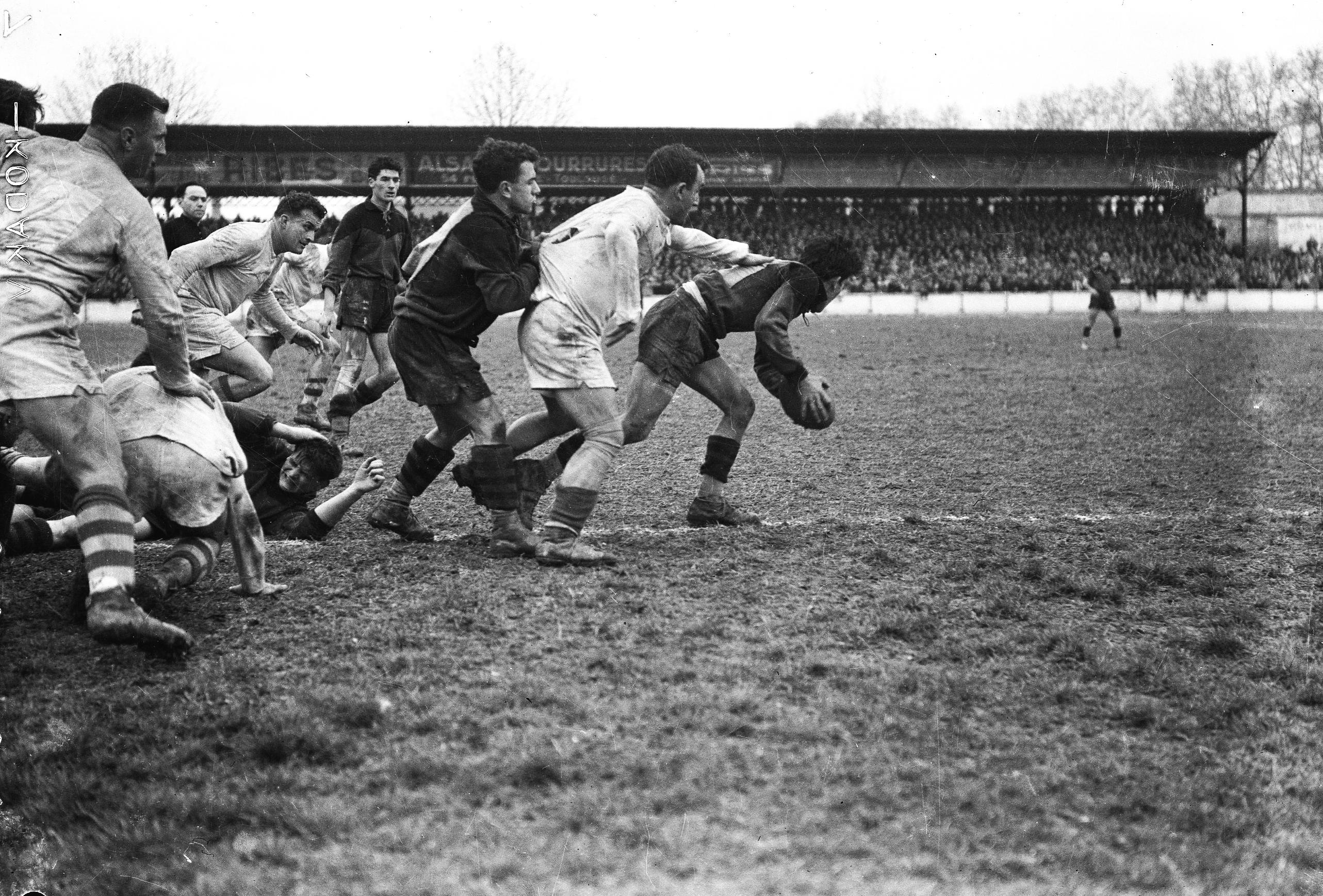 Stade du Hameau. Le 5 Février 1950. Vue d'une phase de jeu entre le Stade Toulousain et Pau au stade du Hameau à Pau.